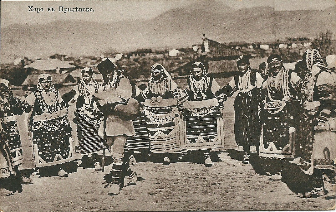 Fête à Prilep (Macédoine) avant 1919